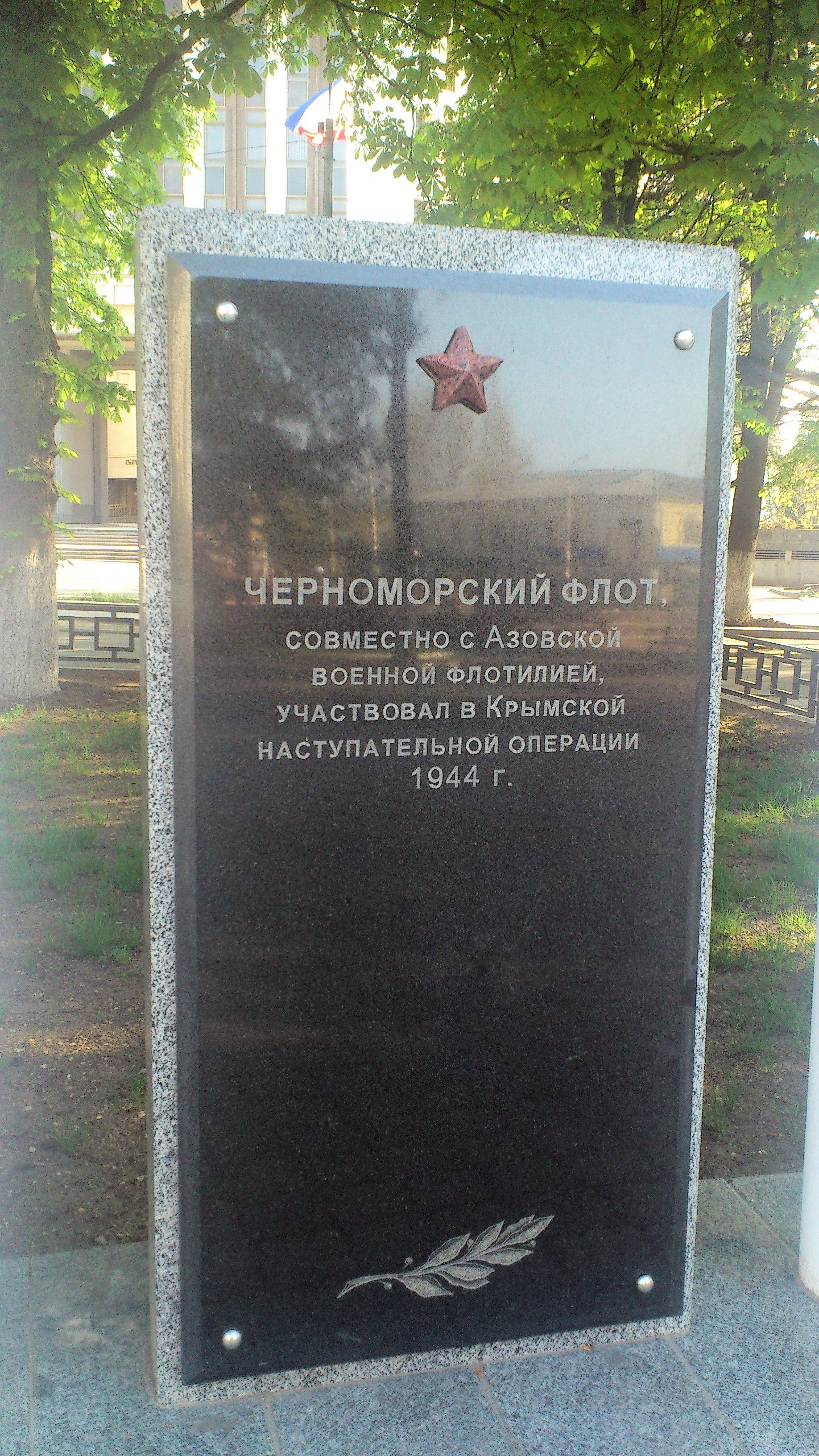 Надпись на плите: "Черноморский флот совместно с Азовской военной флотилией участвовал в Крымской наступательной операции 1944 г."